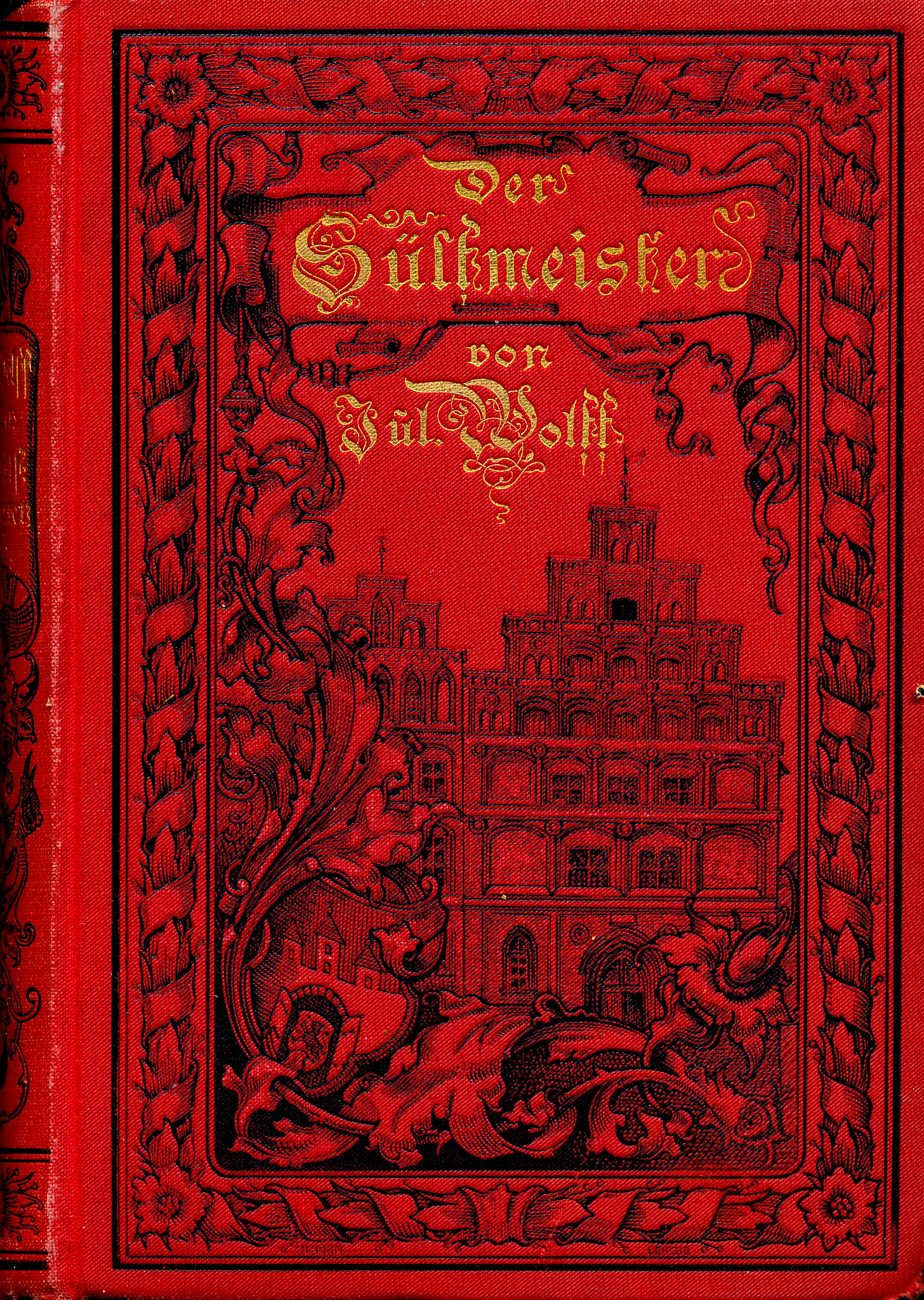 Julius Wolff: Der Sülfmeister - eine alte Stadtgeschichte, Berlin 1884 (Bucheinband)